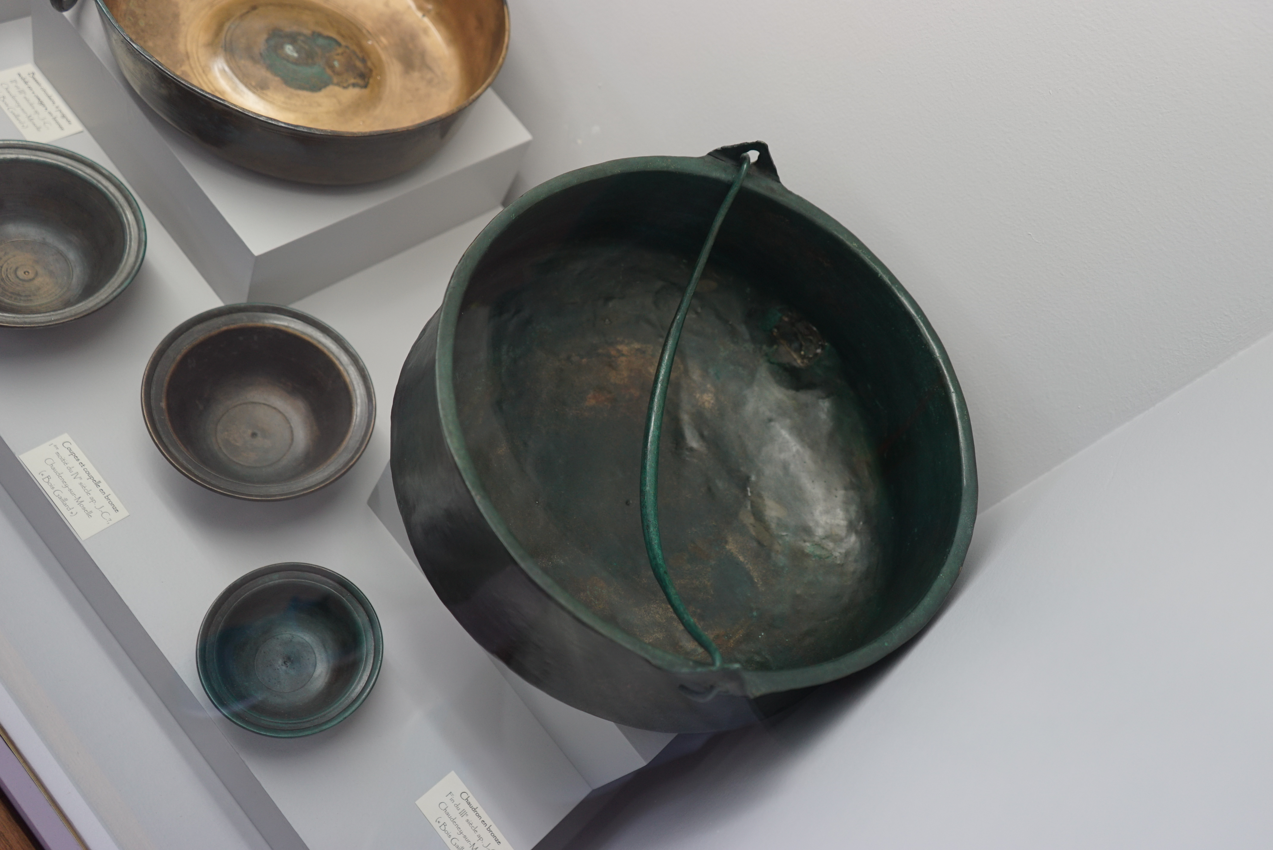 présenté au musée de Toul.